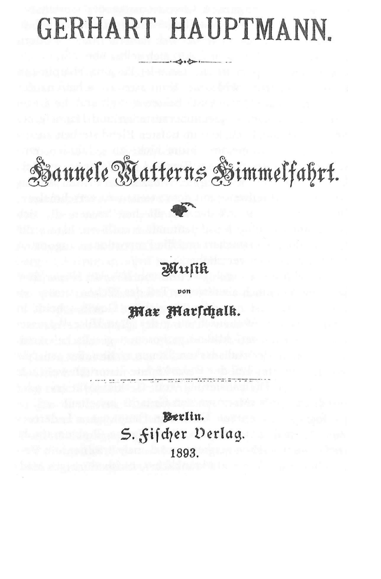 Gerhart Hauptmann: Hannele Matterns Himmelfahrt. Musik von Max Marschalk. Berlin. S. Fischer Verlag 1893 Quelle: Eberhard Hilscher: Gerhart Hauptmann. 3., überarb. Aufl.Berlin : Verl. der Nation 1979, S. 173